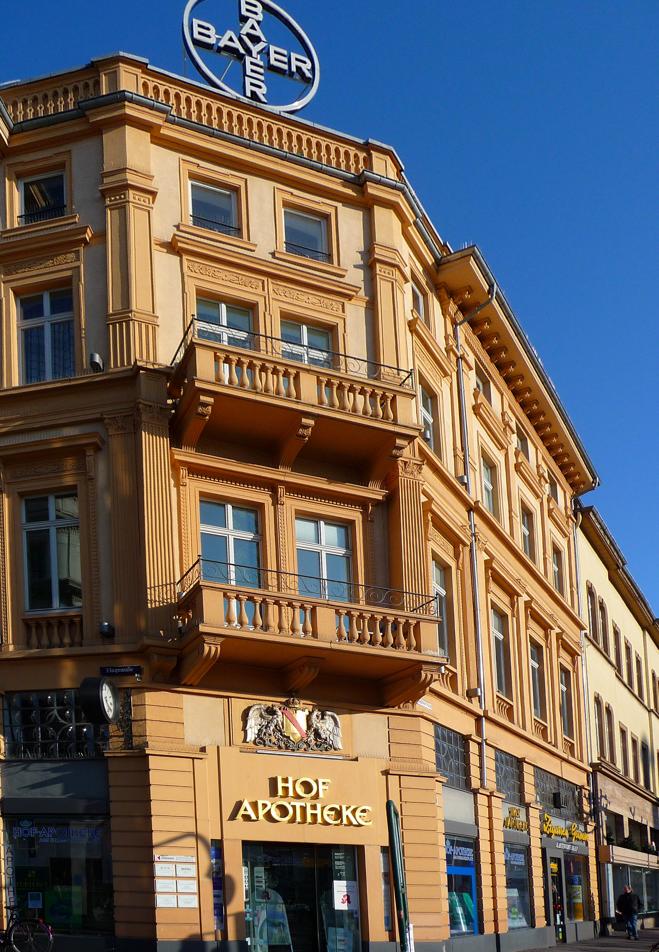 Hofapotheke in Heidelberg, am Anfang der Fußgängerzone in der Altstadt (Baden-Württemberg, Deutschland)